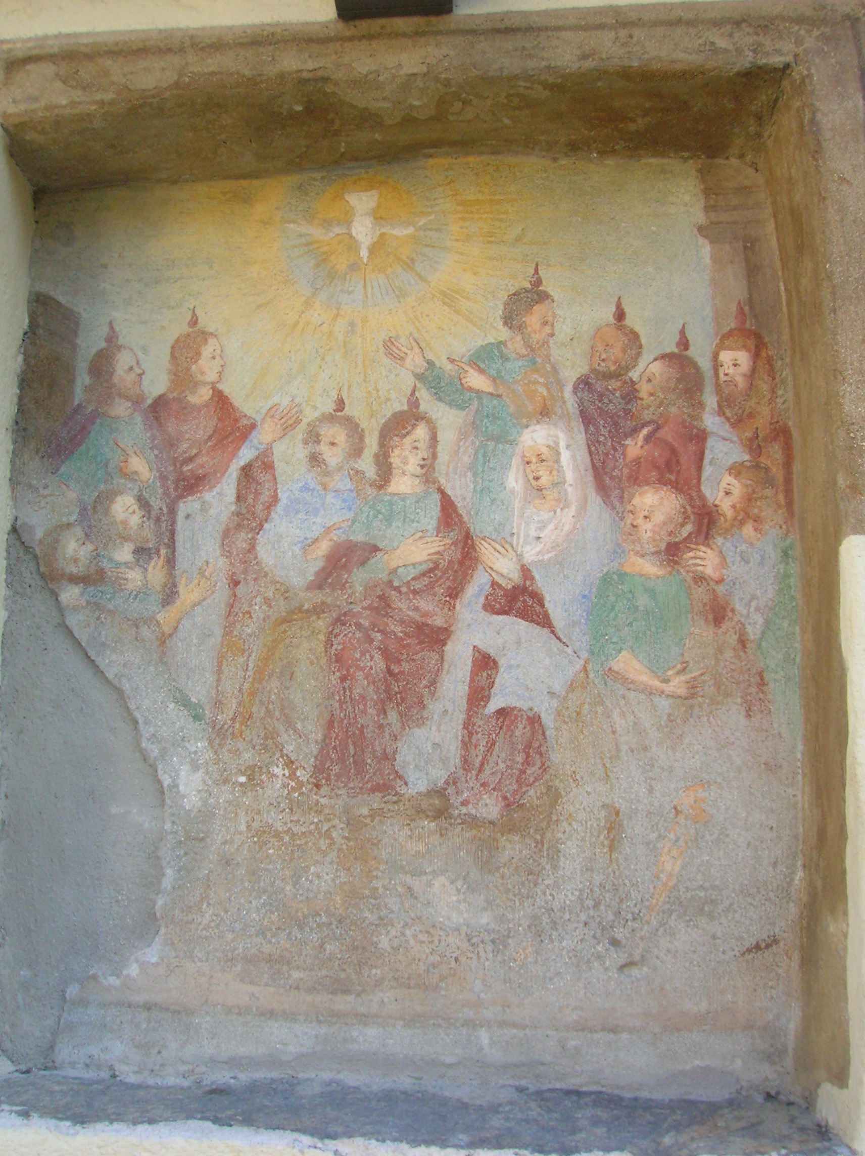 Affresco all'esterno dell'Ecomuseo della Latteria turnaria di Treby, Confrérie du Saint-Esprit / Confraternita dello Spirito Santo, in Via Tréby, Donnas, Valle d'Aosta, Italia. This is a photo of a monument which is part of cultural heritage of Italy.